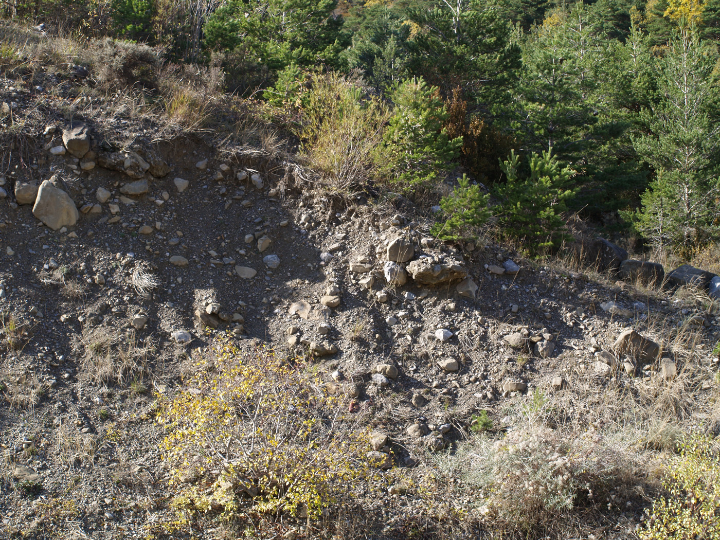 Morrena ubicada muy cerca de la ermita de Santa Elena, en las proximidades de Biescas (Huesca)